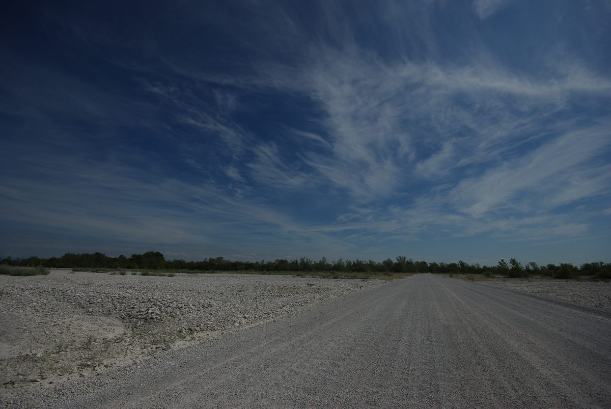 Ausgetrocknetes Flußbett des Torrente Meduna, Straßenführung der SP27 Mitte September 2019